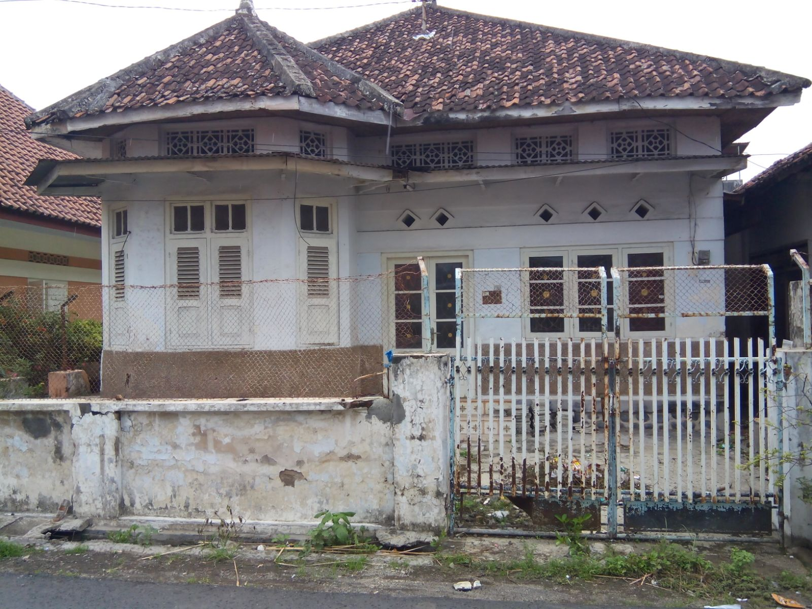 Di Kampong Wisata Temenggungan banyak terdapat rumah-rumah kuno dengan arsitektur era kolonial. Rumah-rumah kuno ini tersebar baik di jalan utama kampung maupun di gang-gang kecil di Kampong Temenggungan